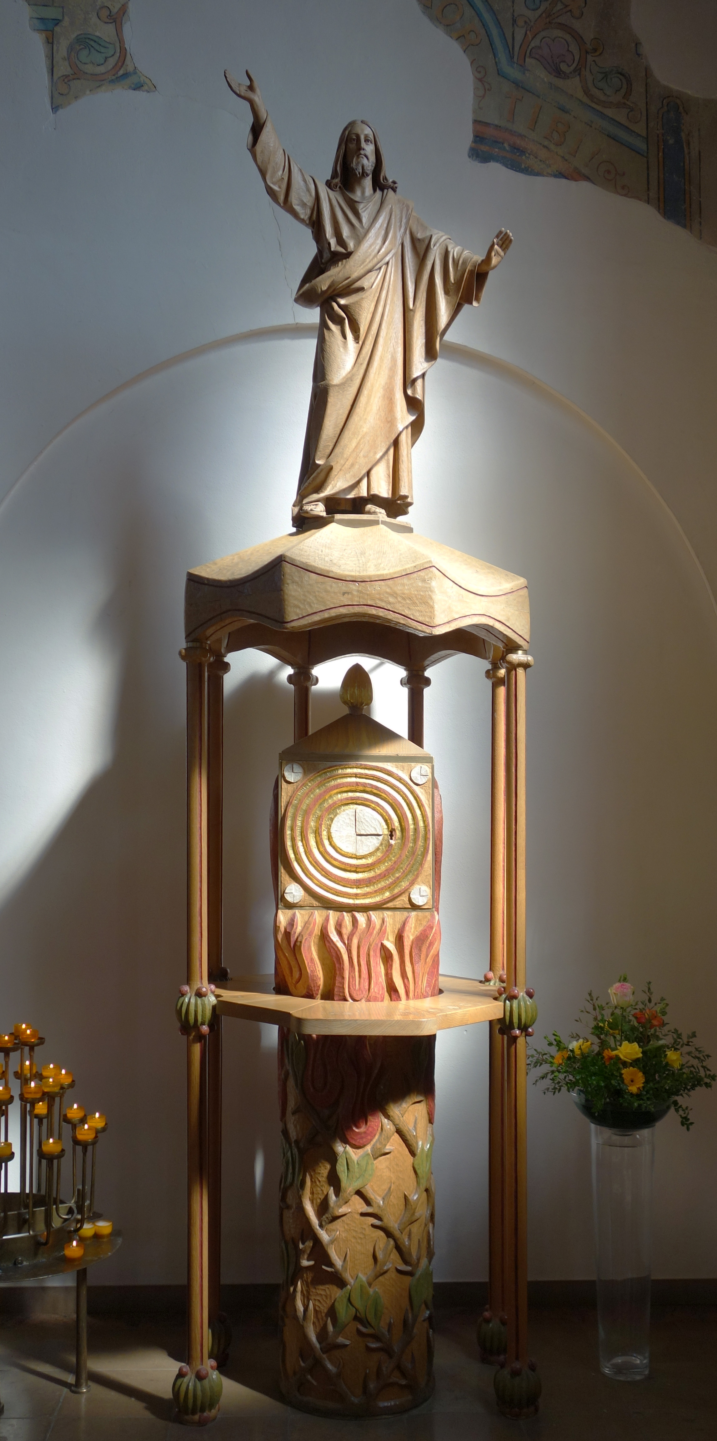 Pfarrkirche St. Maria-St. Vicelin, Neumünster, Tabernakel